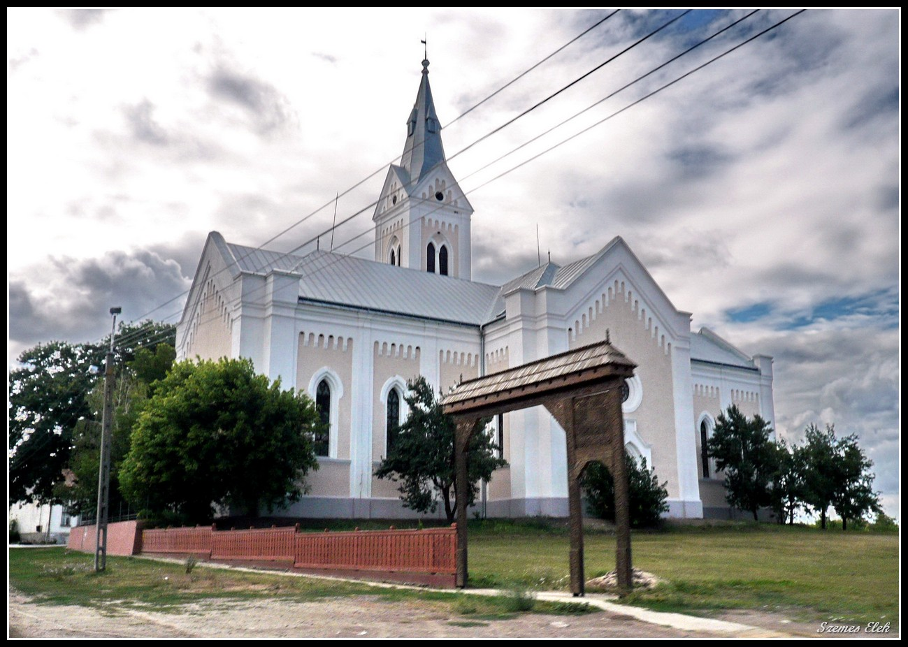 Ref. templom. 19. sz., Rákóczi u., Nagyecsed, Hungary